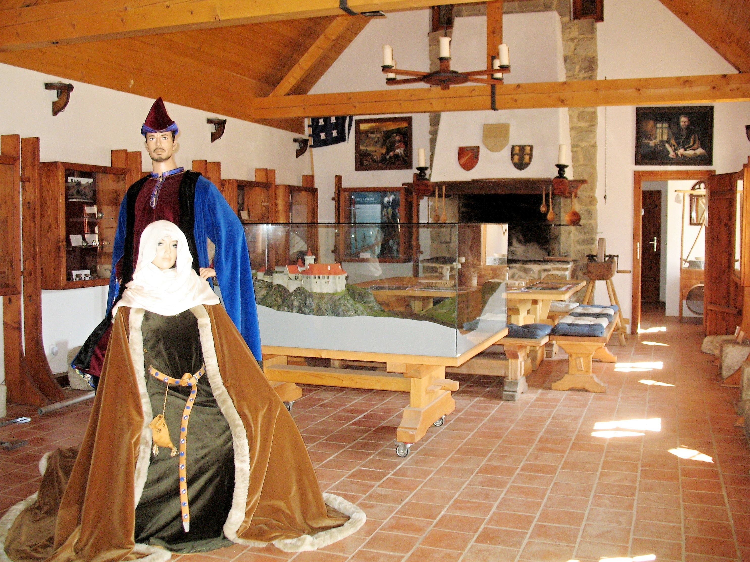 Muzeum na hradě Pořešín u Kaplice, okres Český Krumlov